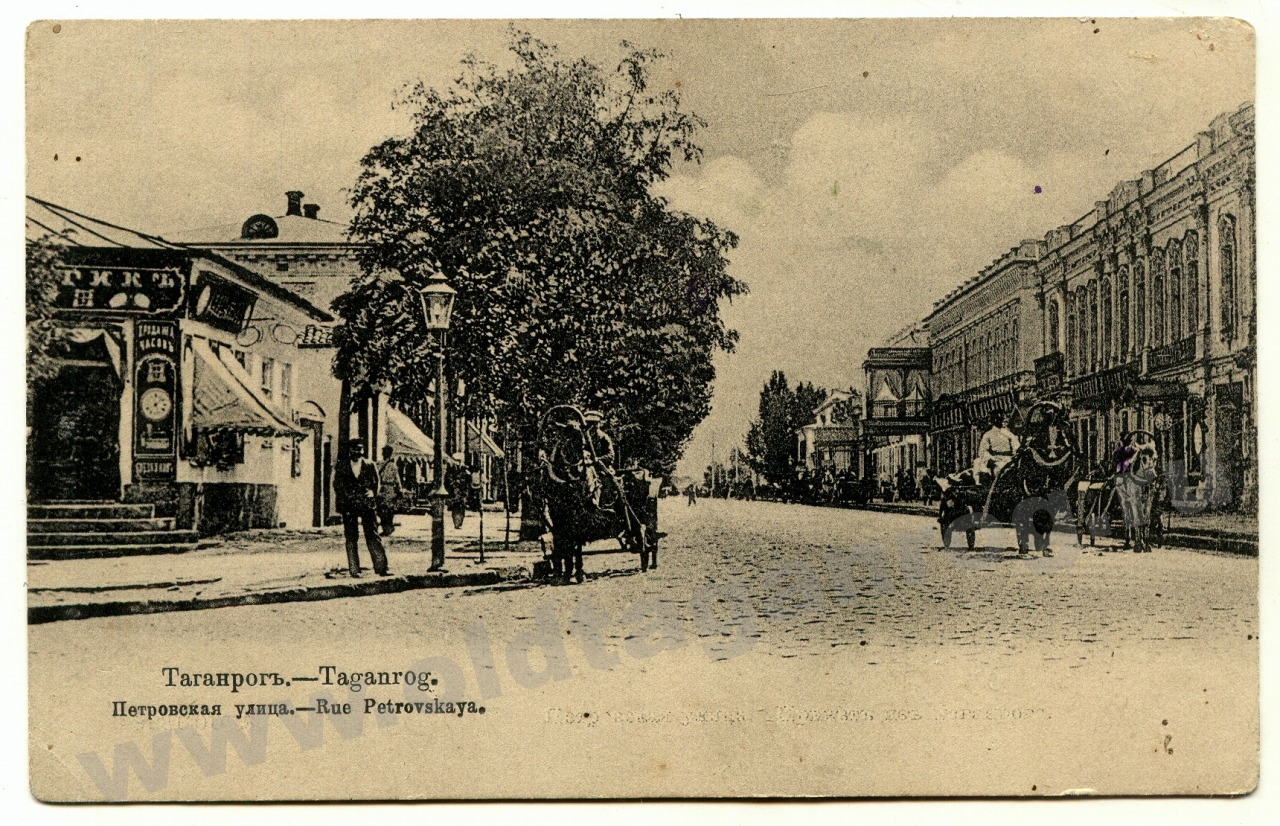 Петровская улица, Таганрог Ростовская область РФ